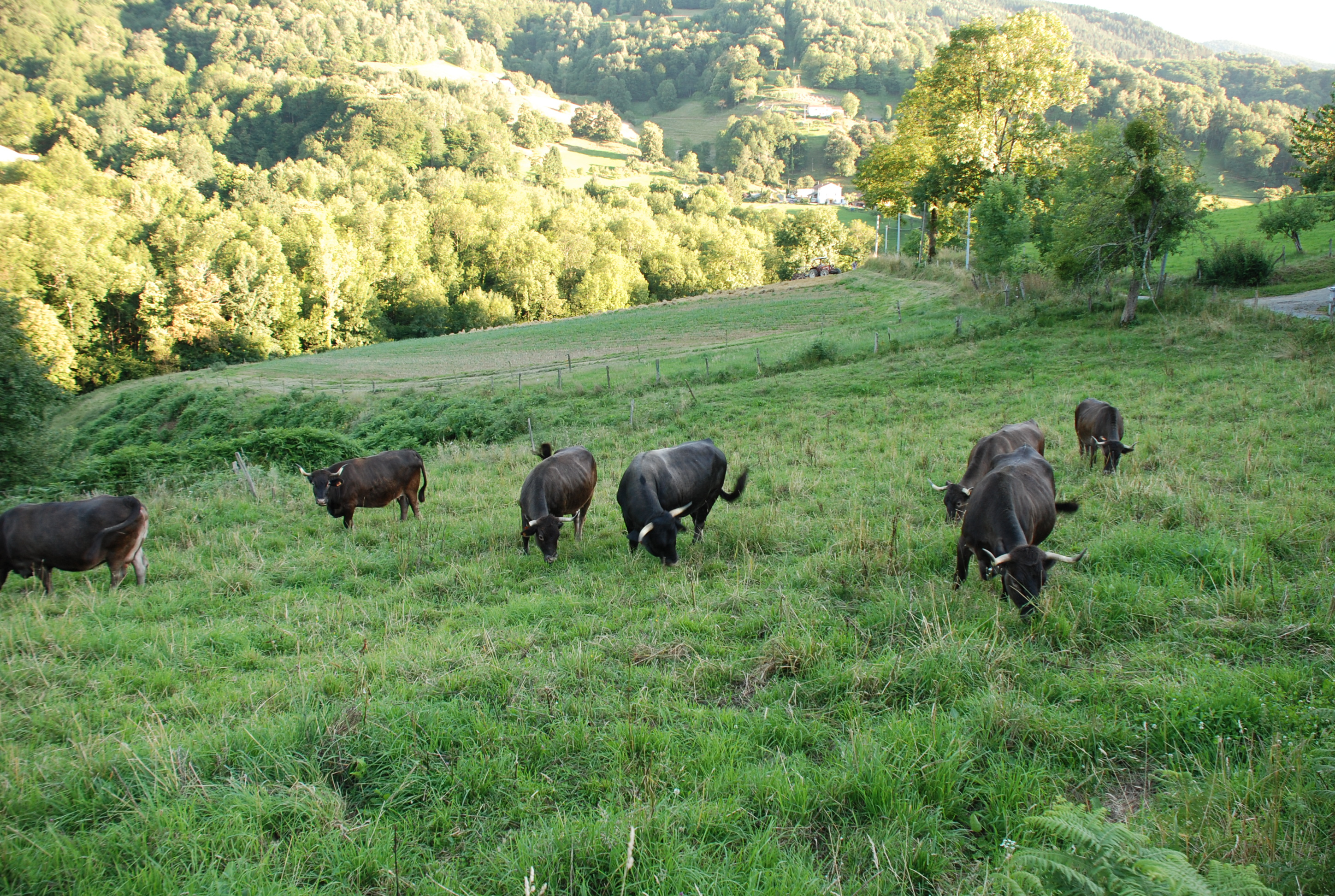 Vaches de la race Aure et saint Girons, aussi appeleée race Casta, photographiées dans le hameau du cap d'Erp, élevage SABADIE, ferme du PESQUE, 09200 ERP. Cet élevage s'est arrêté en 2013.